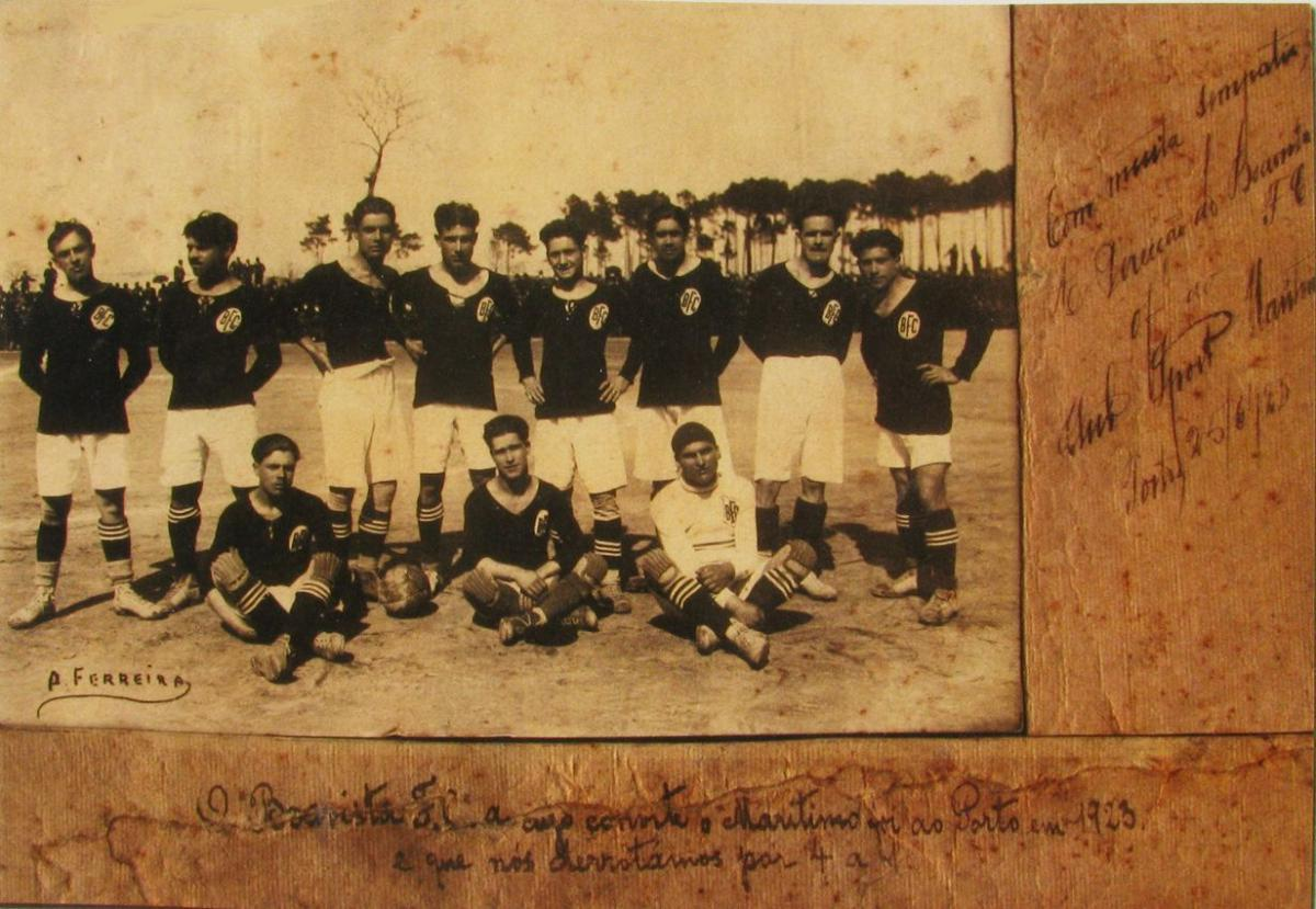 Equipa de futebol do Boavista Futebol Club. Com muita simpatia, A Direcção do Boavista FC oferece ao Club Sport Marítimo, Porto, 25/6/1923. O «Boavista FC» a cujo convite o «Marítimo» foi ao Porto em 1923. E que nós derrotámos por 4 a 1. Colecção Club Sport Marítimo.